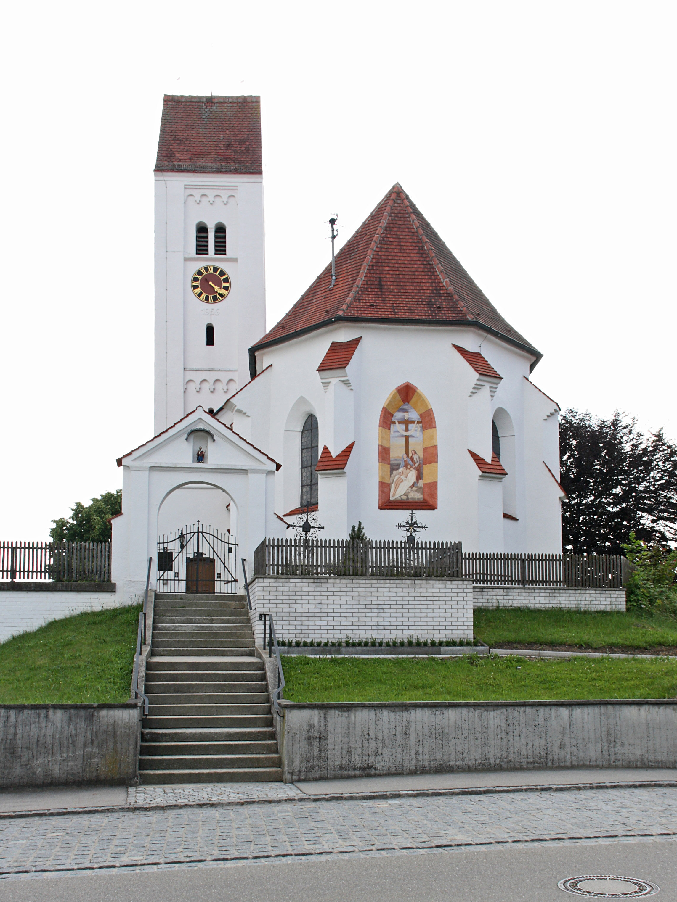 Ostansicht